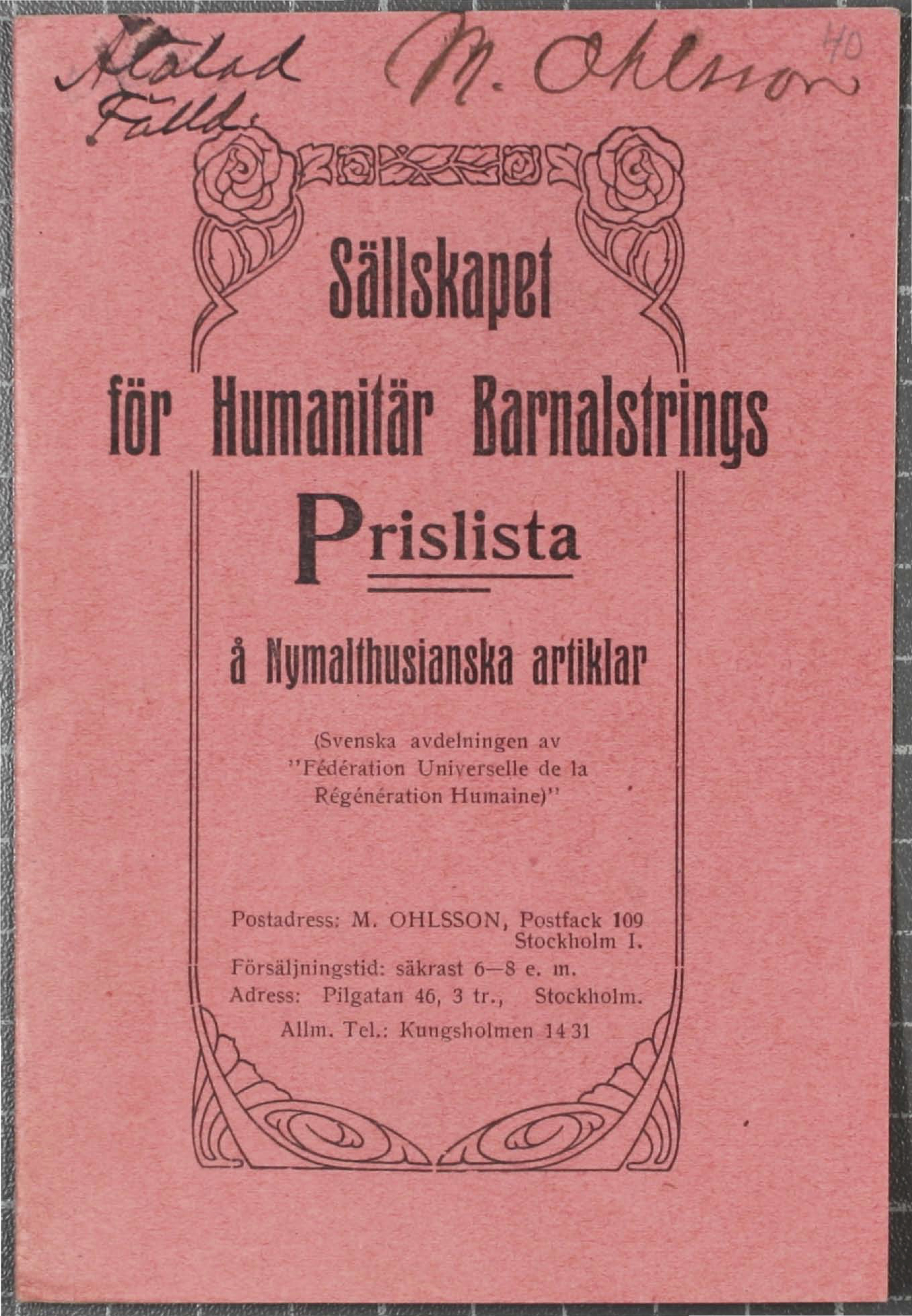 Reklamhäfte från Sällskapet för Humanitär Barnalstring 1914. Anton Nyströms exemplar